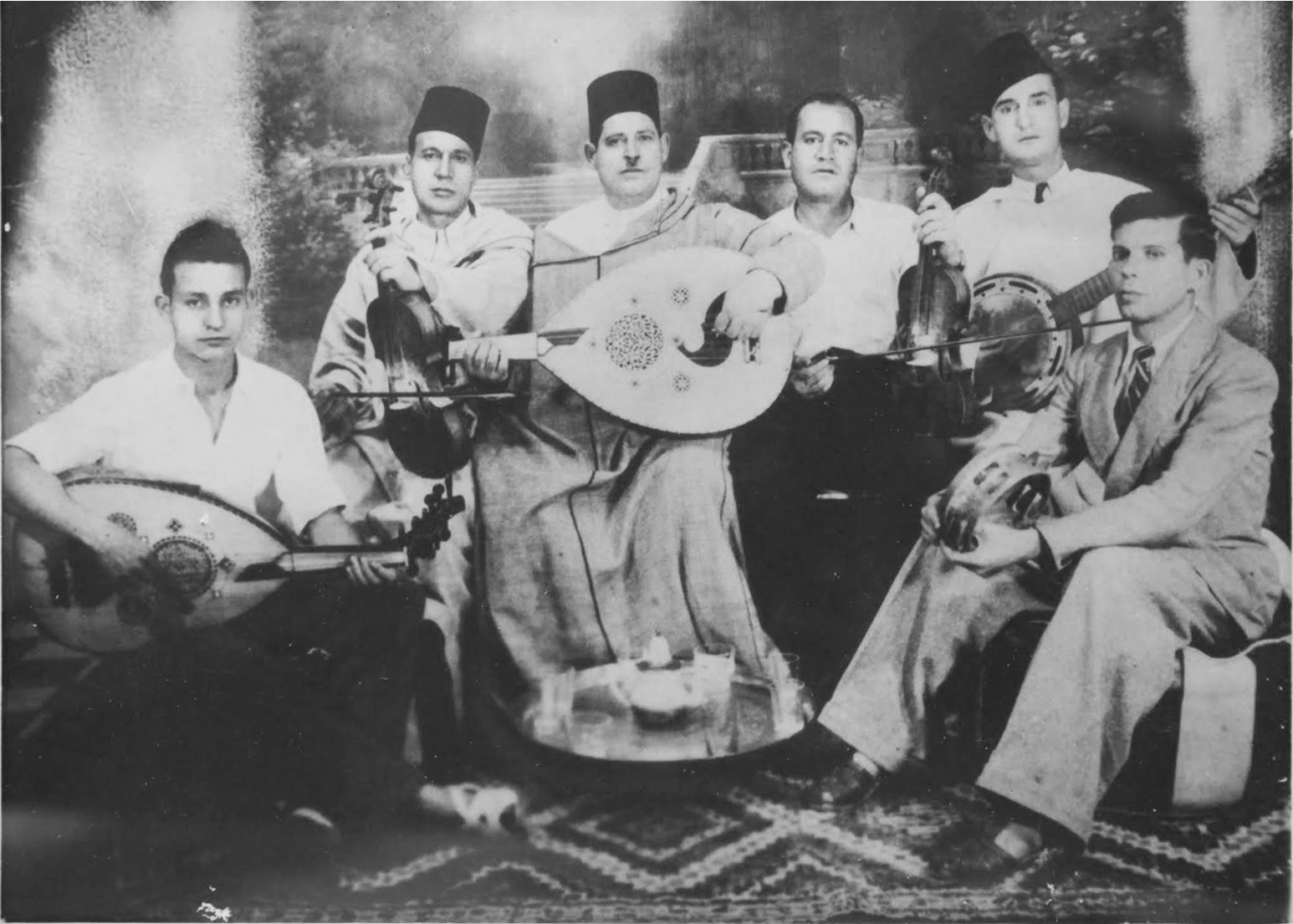 משמאל לימין: סלימן אלמגריבי, מרדכי בן-חמו - אביו של סלימן, "מועלם" דוד בן הרוש, מימון תורג'מן, יעקב זרד ויעקב אטיאס - אביו של שייך מואיז'ו.